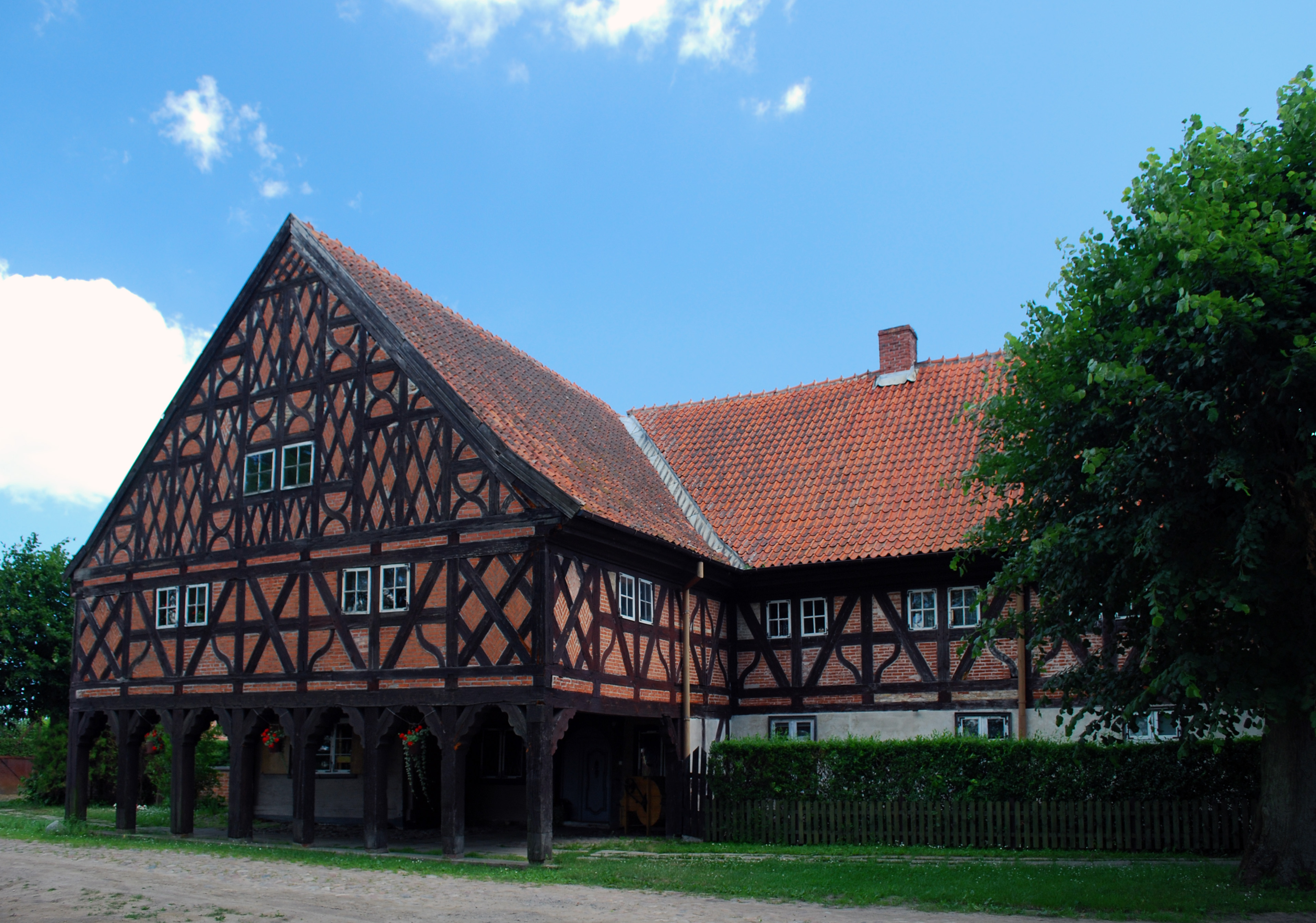 Trutnowy - dom podcieniowy nr 4, 1720